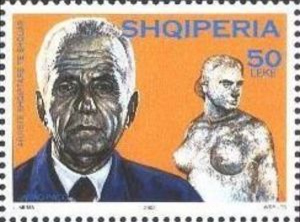 Janaq Paço (1914-1991), Albanian sculptor